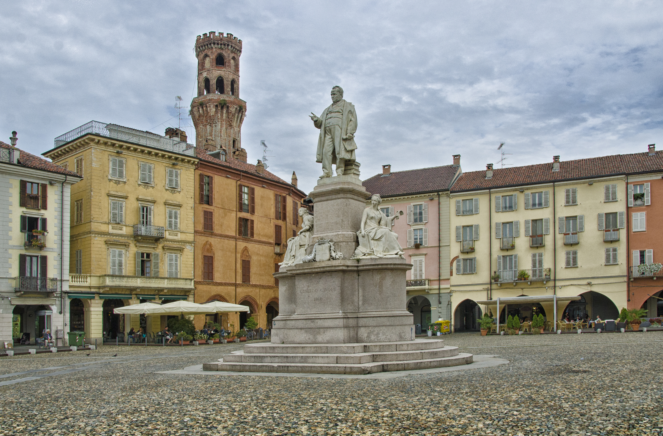 Piazza Cavour e monumento This is a photo of a monument which is part of cultural heritage of Italy.